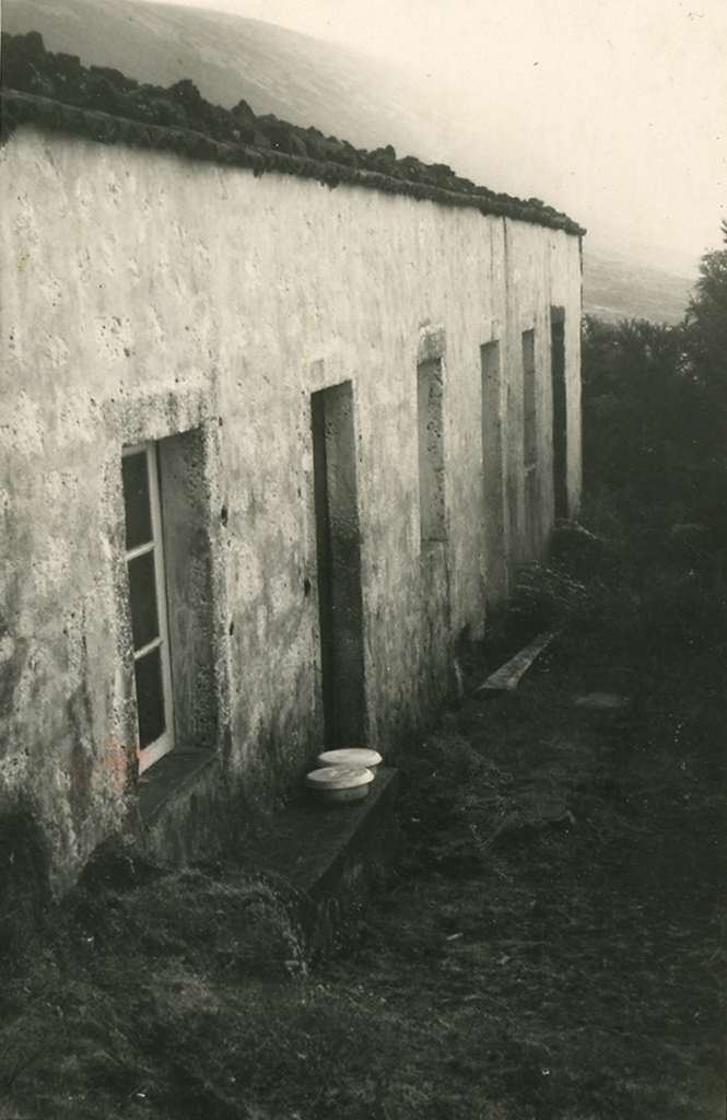 Fábrica de queijo de Rafael Simas, na Ilha do Pico, no arquipélago dos Açores, em Portugal (por volta de 1947). Rafael Simas cheese factory, Santo Amaro, Pico, Azores (circa 1947).